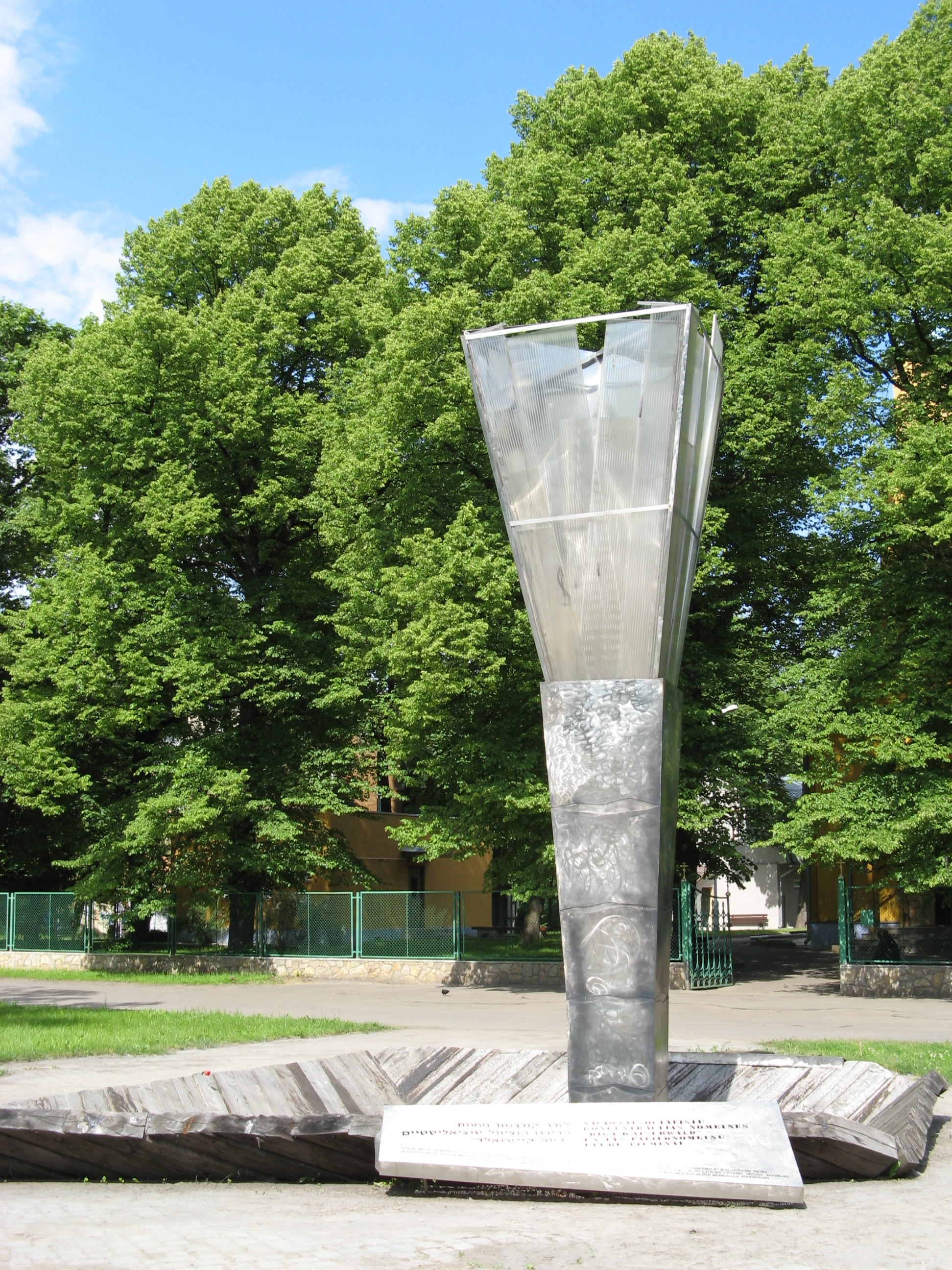 Памятник узникам лагеря Кайзервальд